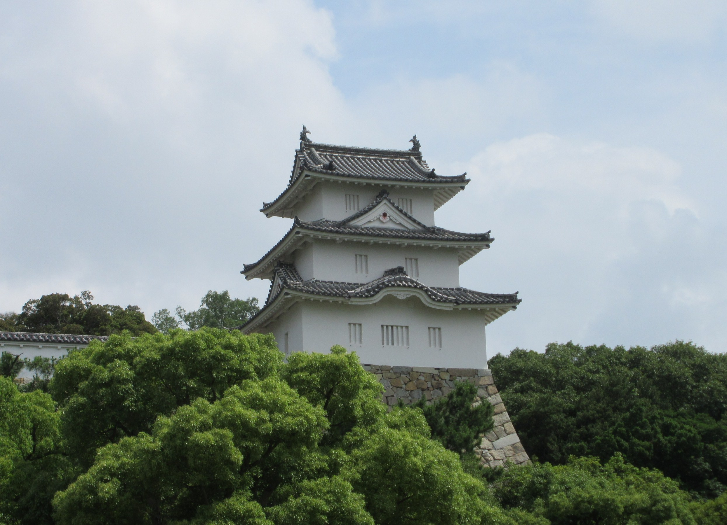 明石城巽櫓